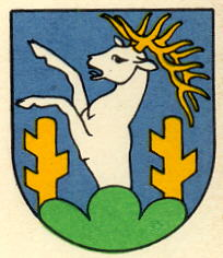 Wappen von Reute Kanton Appenzell Ausserrhoden Schweiz